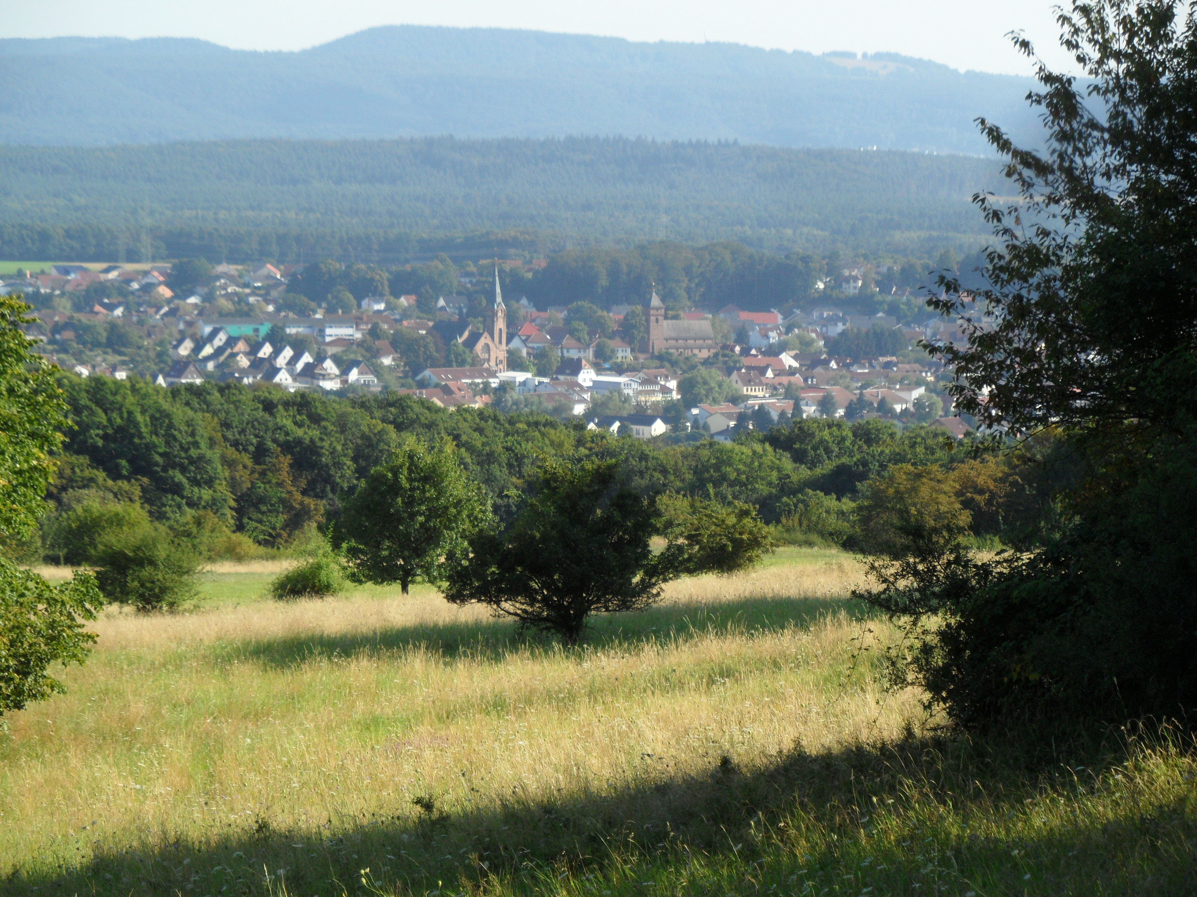 Erzenhausen, Landkreis Kaiserslautern, NSG Magerwiesen am Eulenkopf, mit Weilerbach im Hintergrund, Blick nach Süden